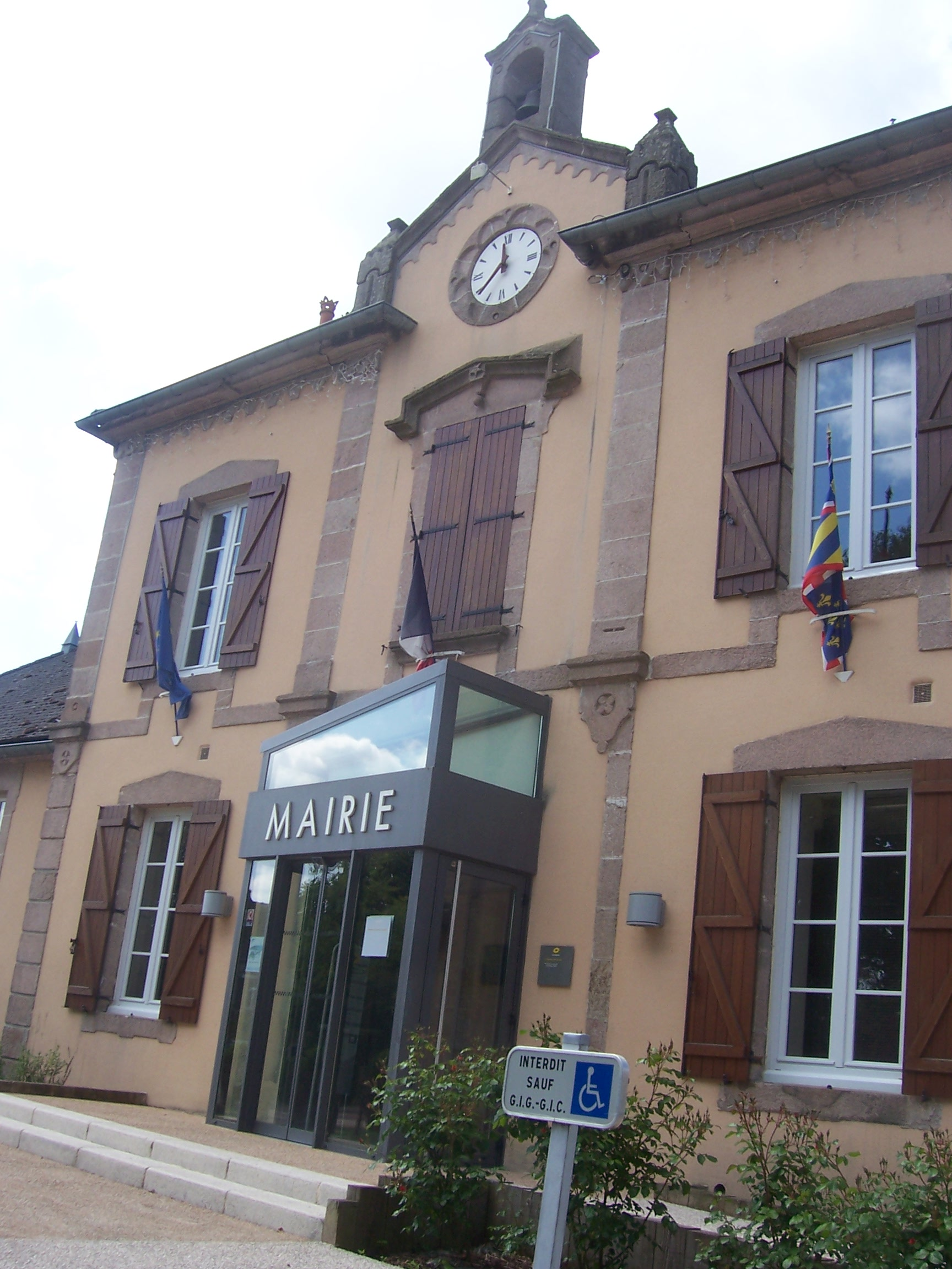 Mairie de Mesvres